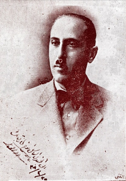 شُكري القوتلي عندما كان وزيرًا للدفاع في سوريا.